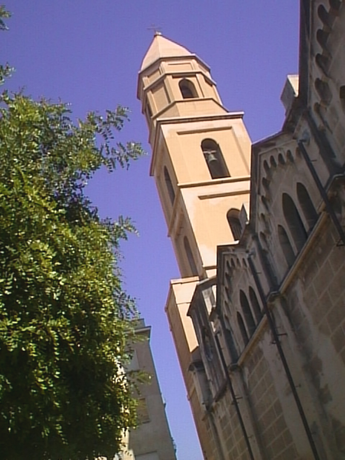 Torre Campanaria della chiesa di Sant'Eulalia, Cagliari